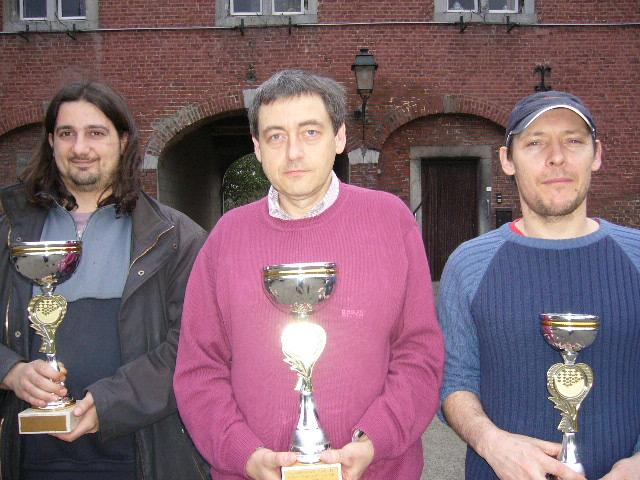 Podium van het Belgisch Kampioenschap Dammen 2008. Van links naar rechts: Wollaert, Lemmens en De Meulenaere